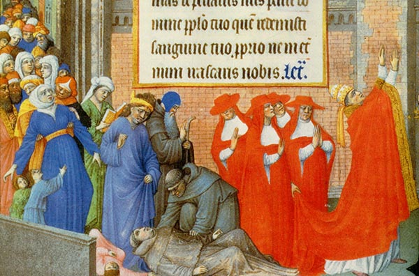 Miniature in a prayer book from the beginning of the 15th Century. Pope Gregory I (590 - 604) leads a procession around the proximity of Rome, in order to pray for the end of the plague. In the foreground two victims have fallen, a child and a monk.